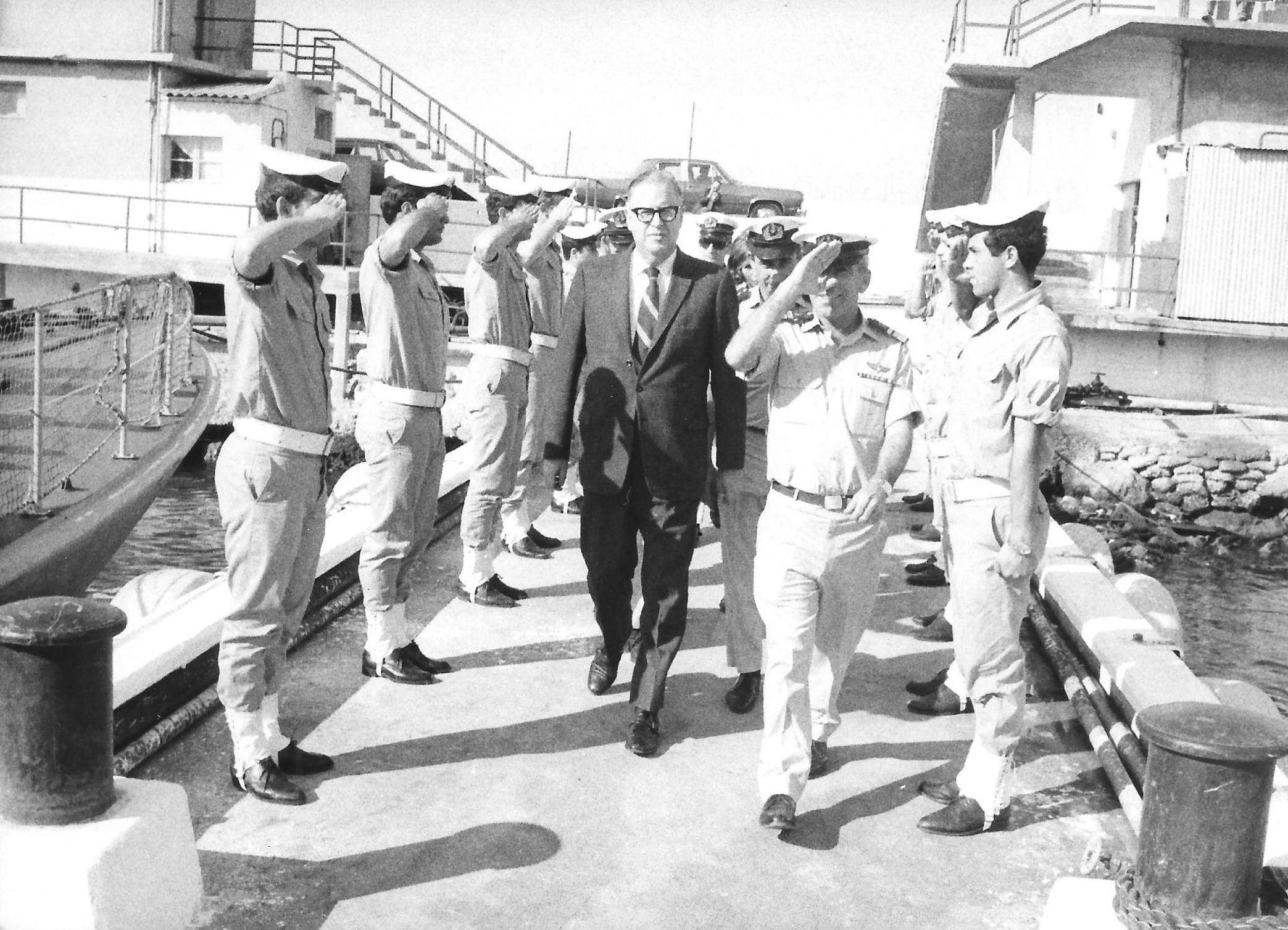 שר החוץ אבא אבן מבקר בחיל הים 20 באפריל 1970